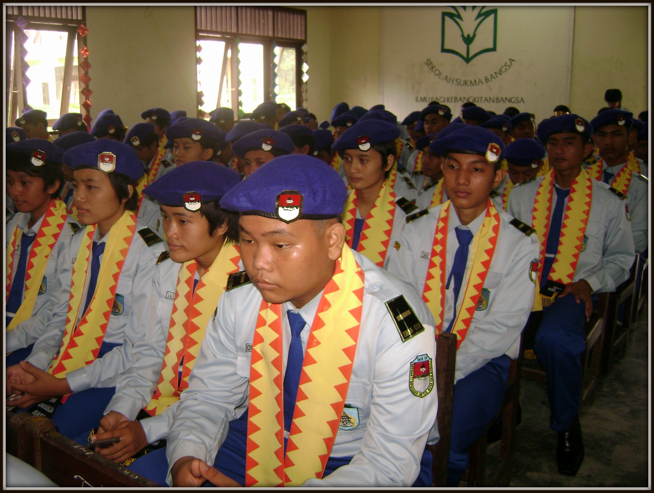 Baju Pesiar Sma Negeri Unggulan Sukma Nias